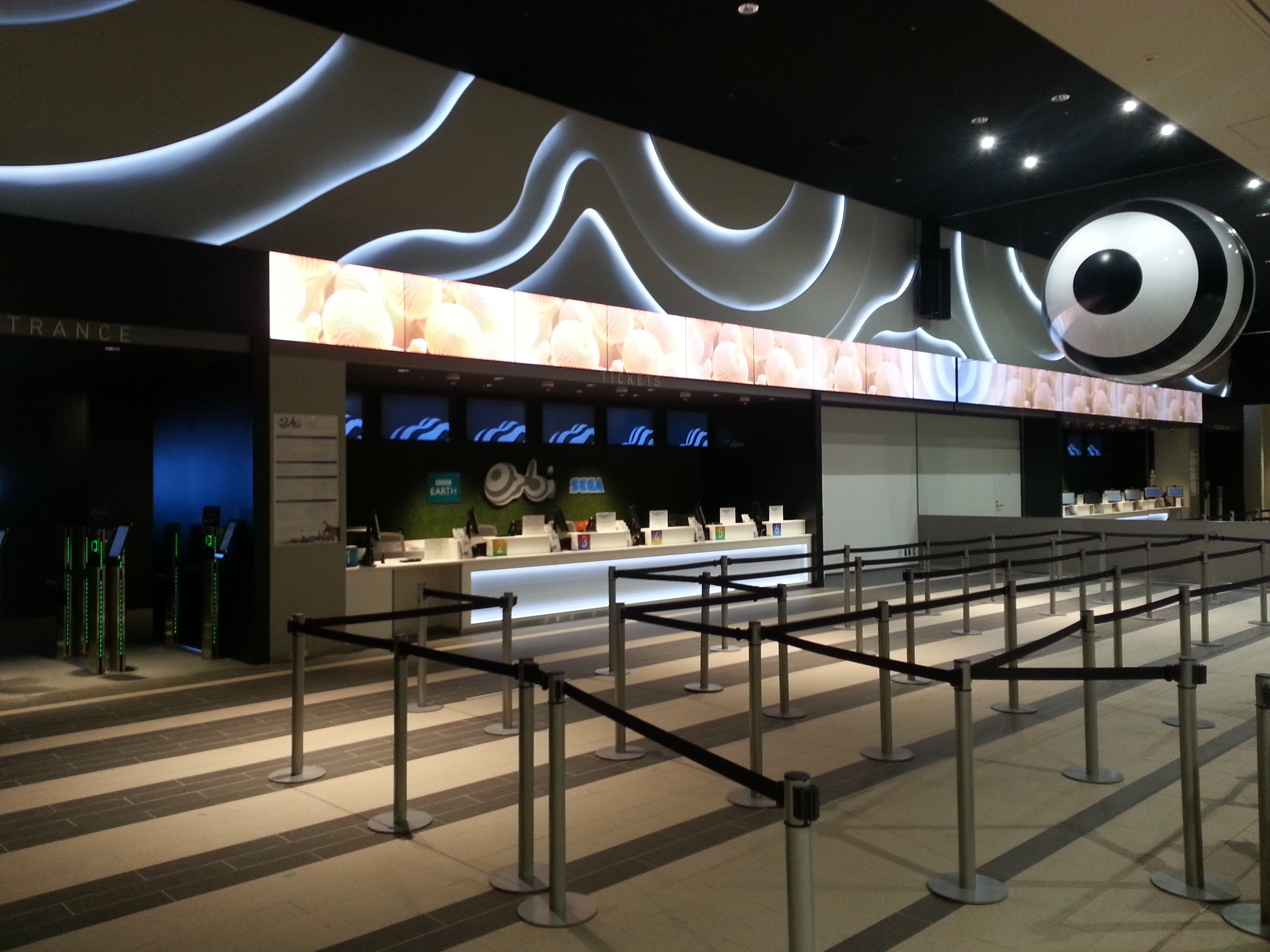 Orbi Yokohama（オービィ横浜）のチケット受付・入場口。